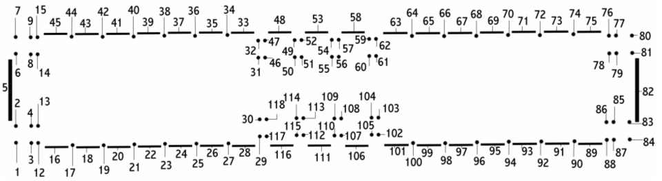 Plan de la galerie des batailles du château de Versailles. Bernard Dominique